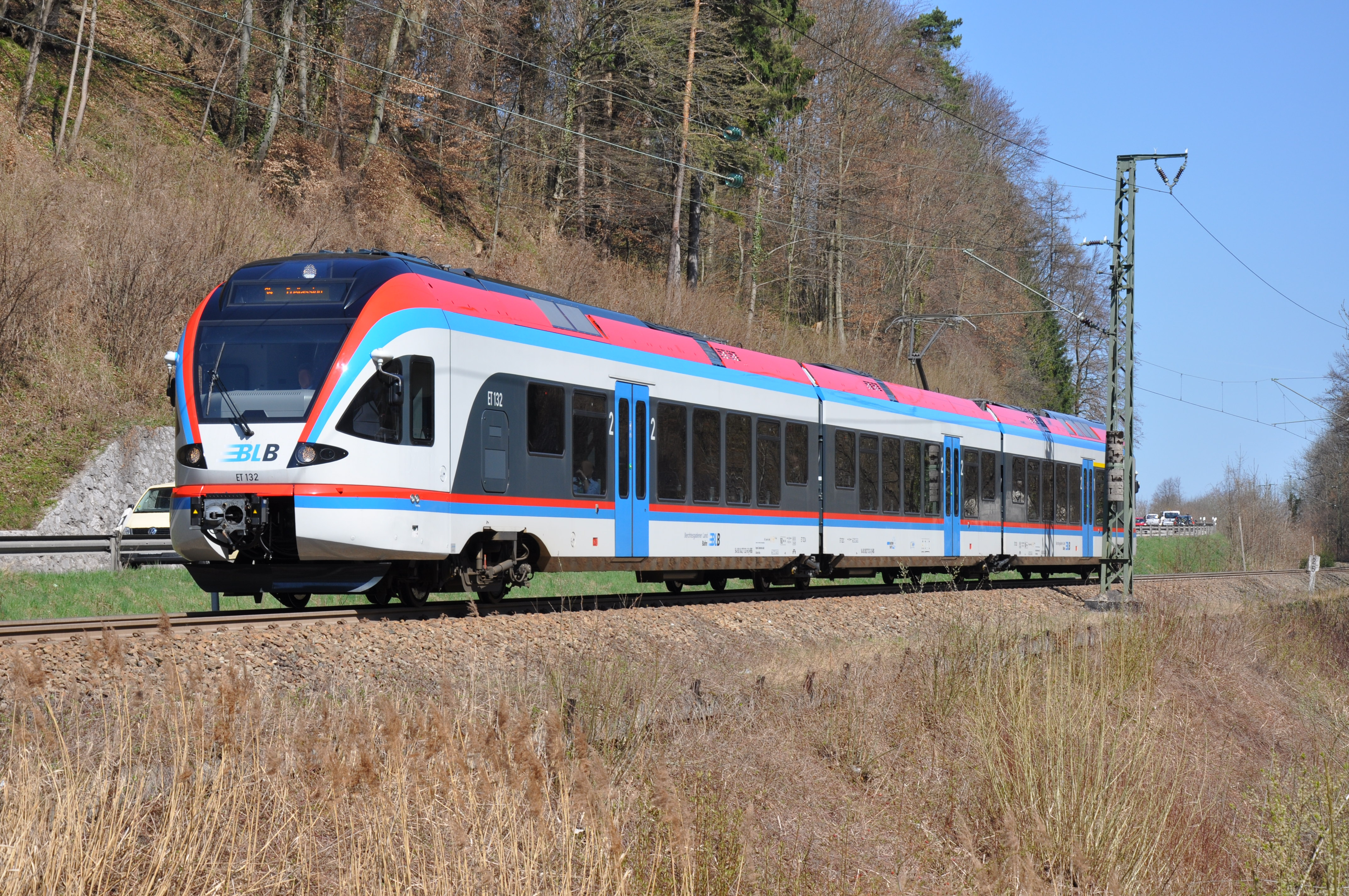 Zug der Berchtesgadener Land Bahn zwischen Bayerisch Gmain und Bad Reichenhall Kirchberg Bei Verwendung bitte ich hier um einen Hinweis, wo das Foto genutzt wird.